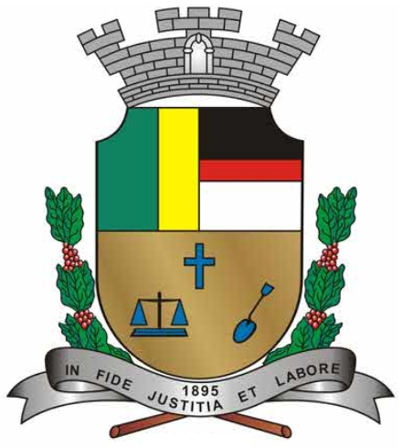 Bandeira do município de Piratininga - SP - Brasil.